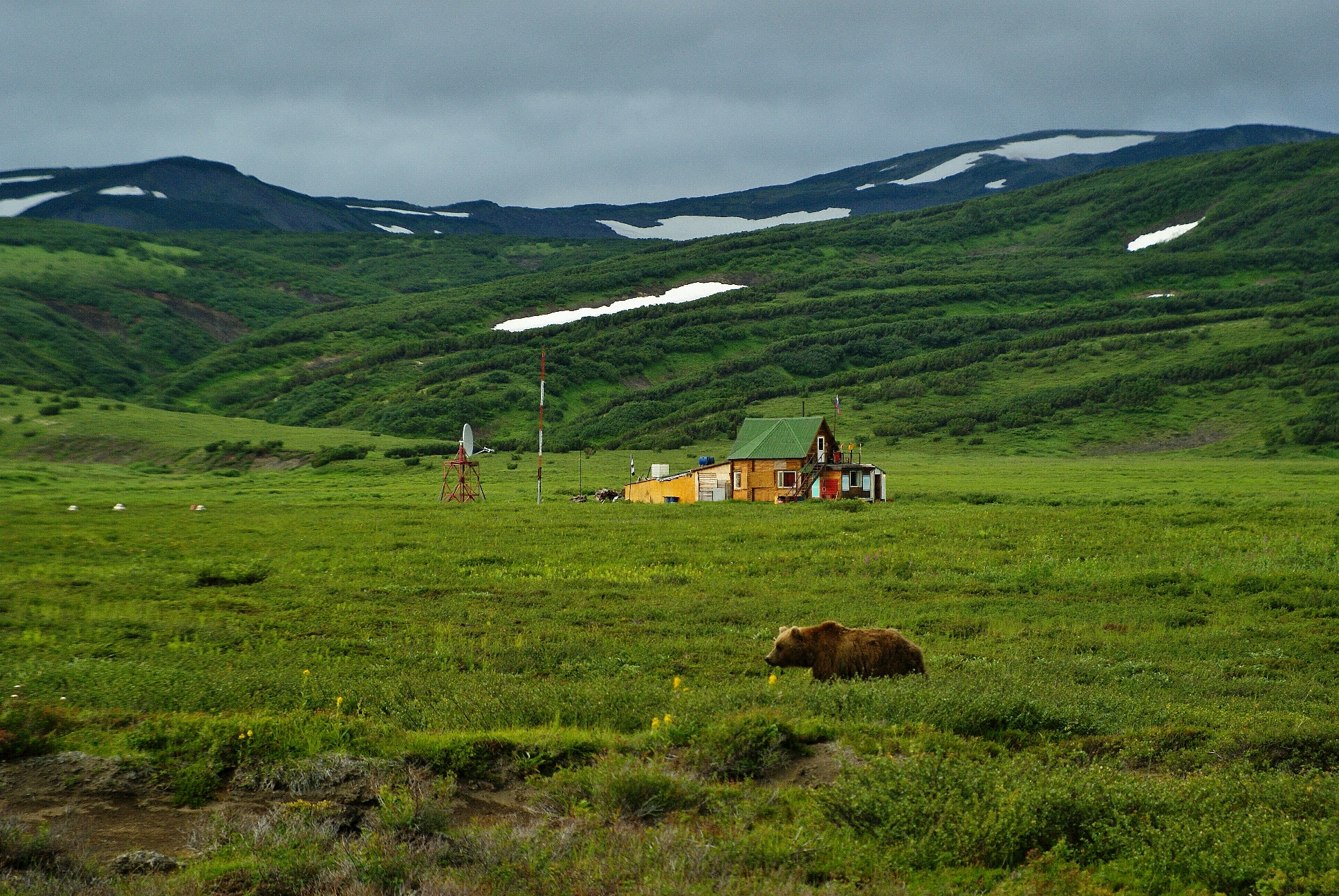 Медведи разгуливают по кальдере, как у себя дома. Ничего удивительно - это и есть их дом, точнее - ясли. Когда они подрастают, то уходят на нерестовые реки, ловить лосось. Кроноцкий заповедник. This image is related to the protected area of Russia number 4100034